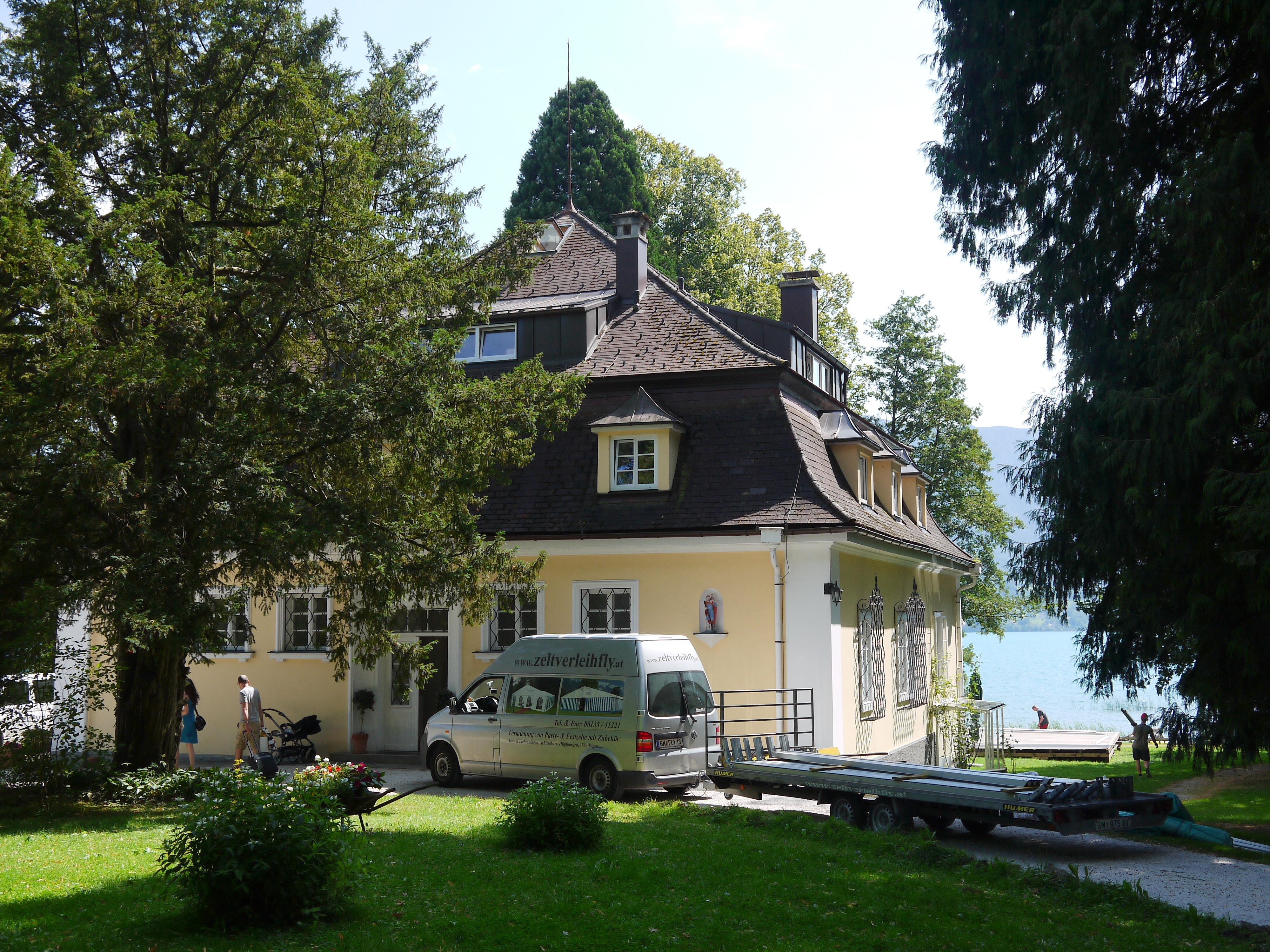 Ehem. Villa Ransonnet, Seminarhotel Grafengut und Bootshaus